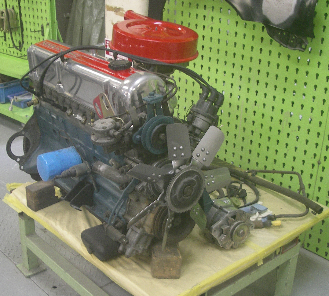 Nissan L20 engine